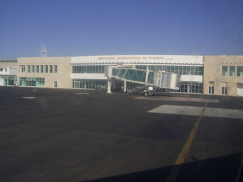 Nueva terminal aérea del aeropuerto de Torreón,Coah. México MMTC